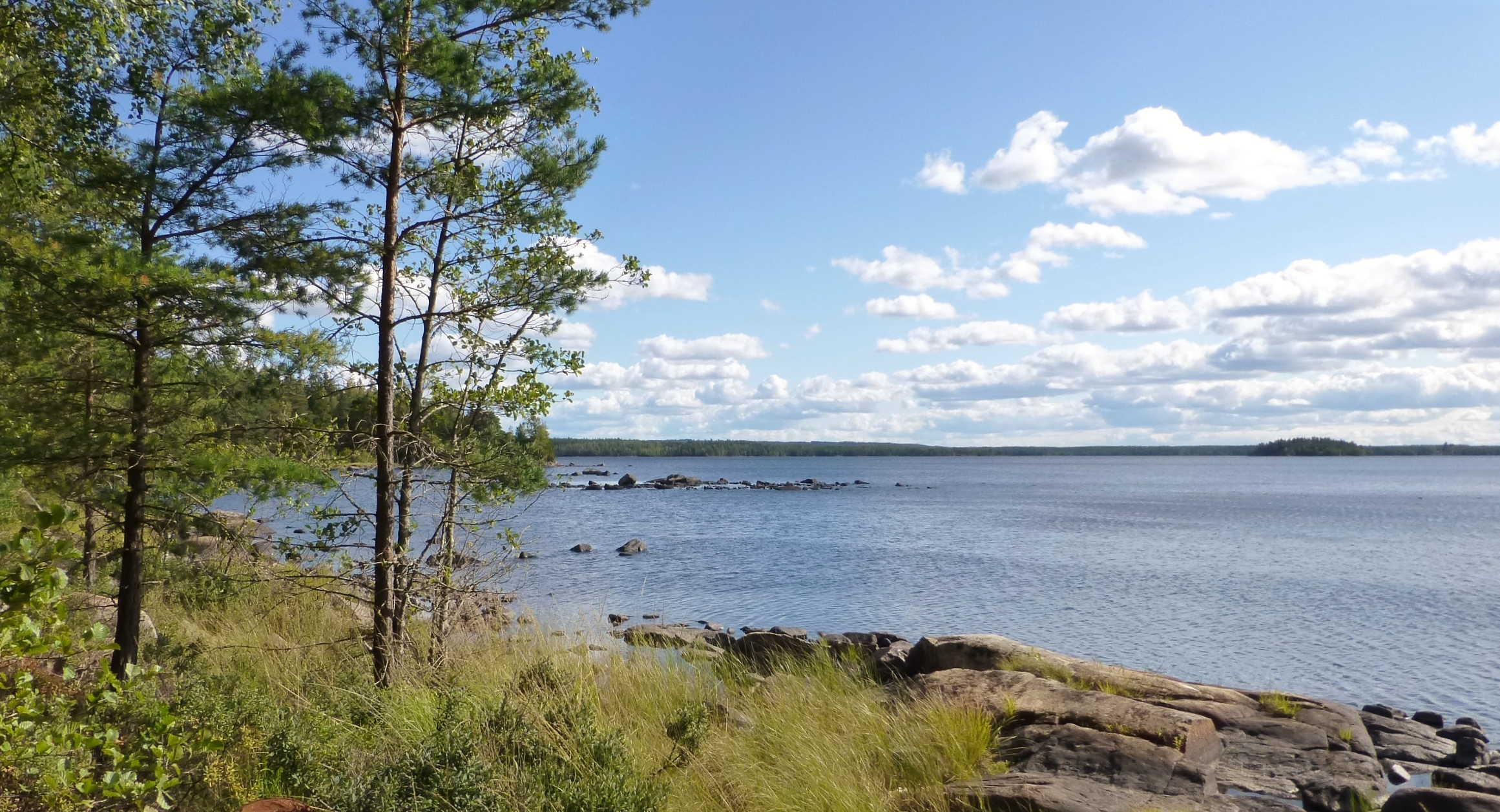 Sjön Madkroken